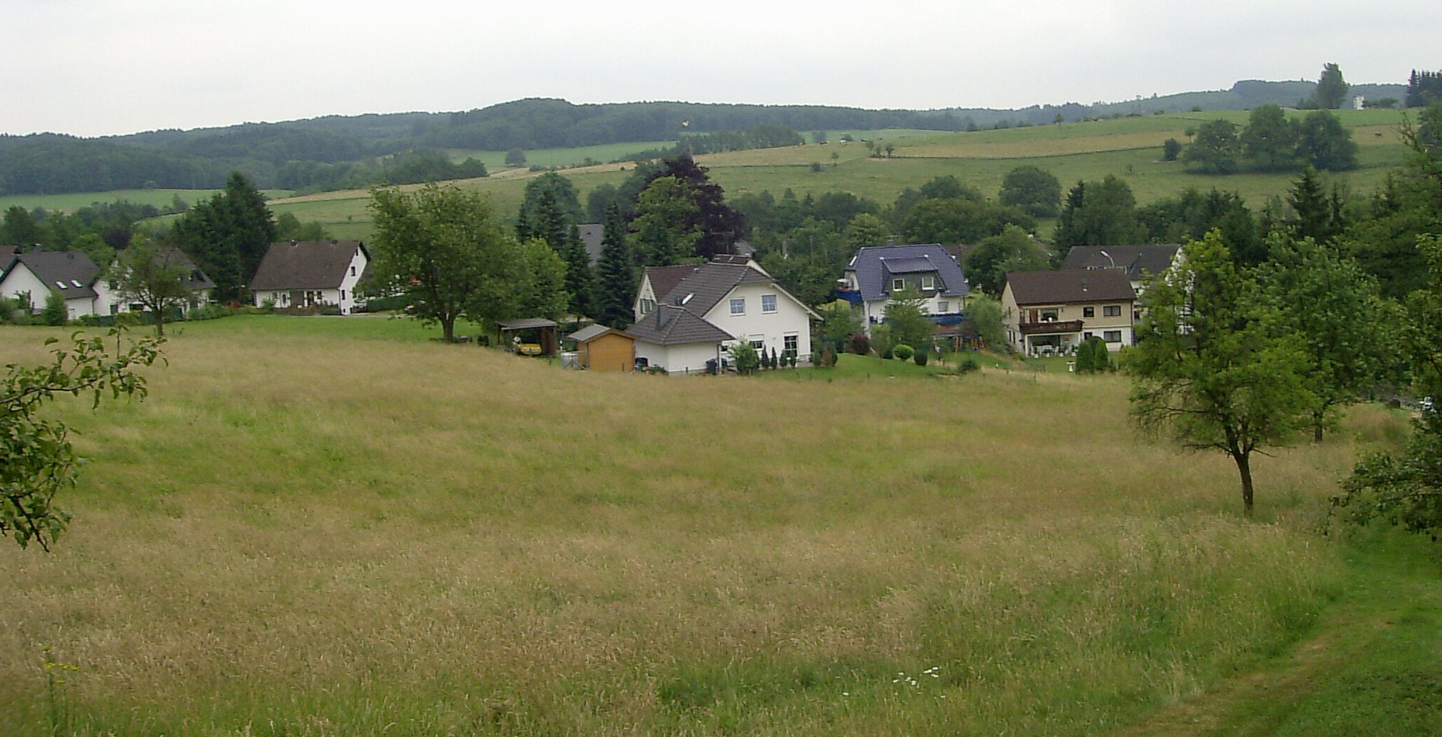 Ziegenhardt, Stadt Waldbröl, Deutschland